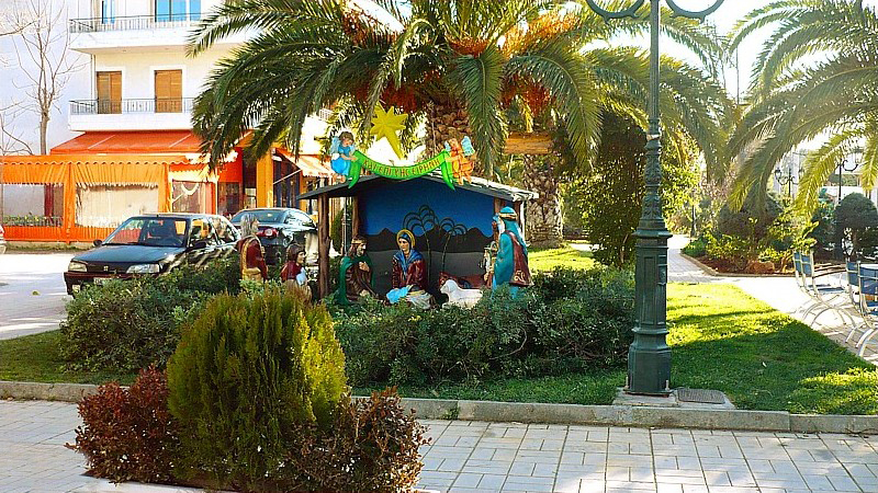 Pallini